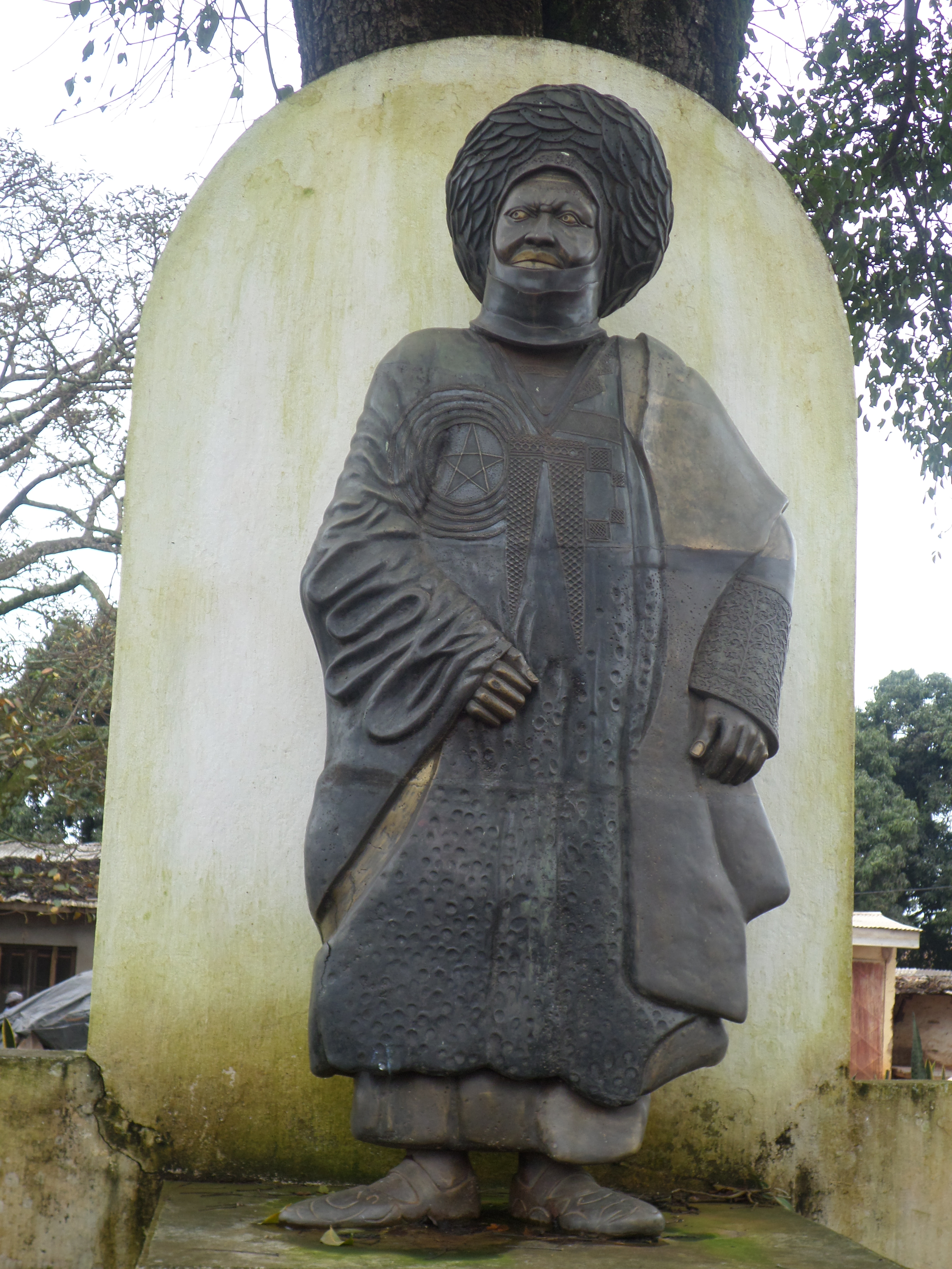 Statut monumental du sultan Njoya à Foumban